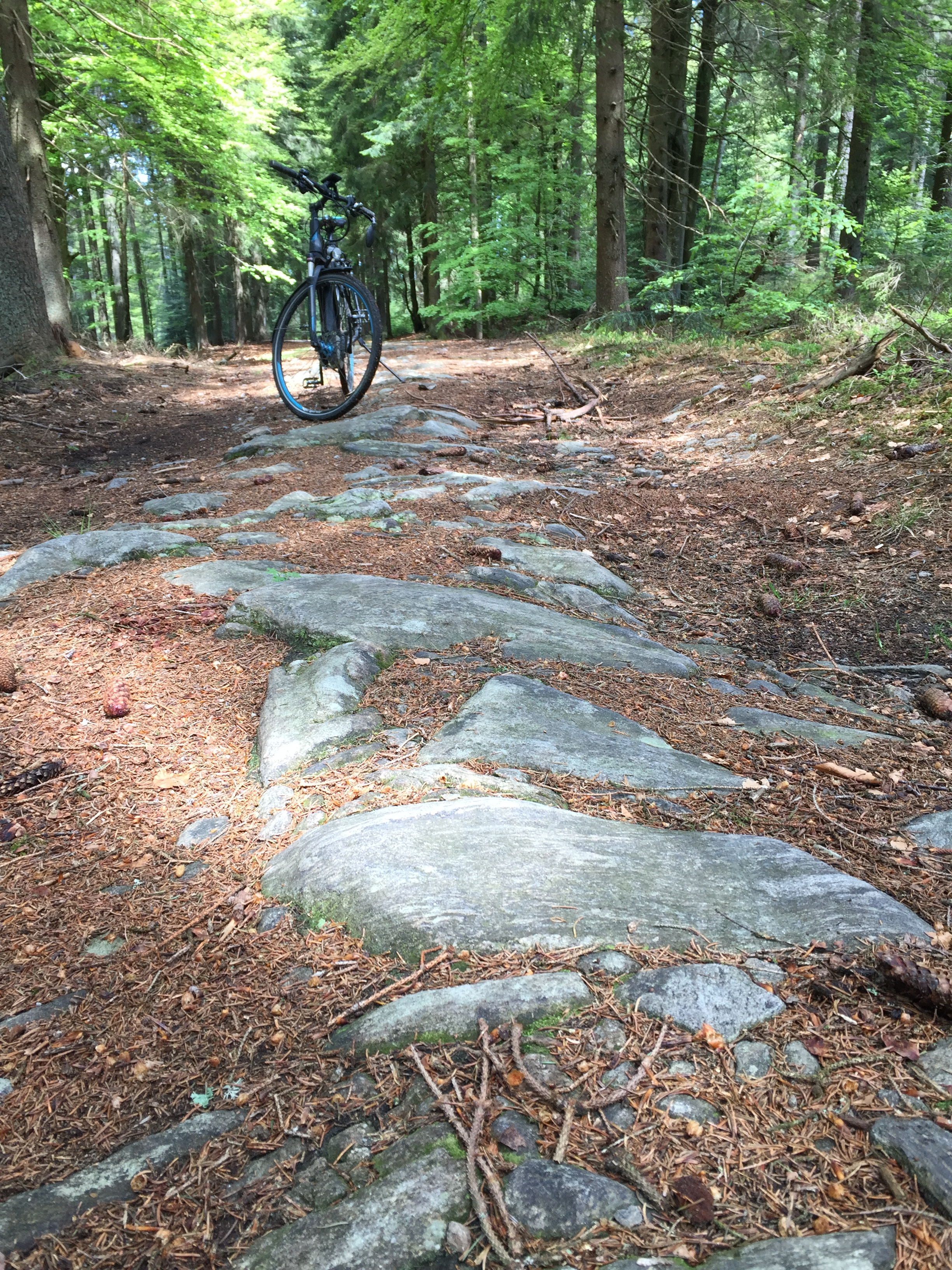 Abschnitt des Böhmwegs zwischen Deggendorf und Zwiesel. An dieser Stelle ist noch der originale Plattenauflag zu erkennen.